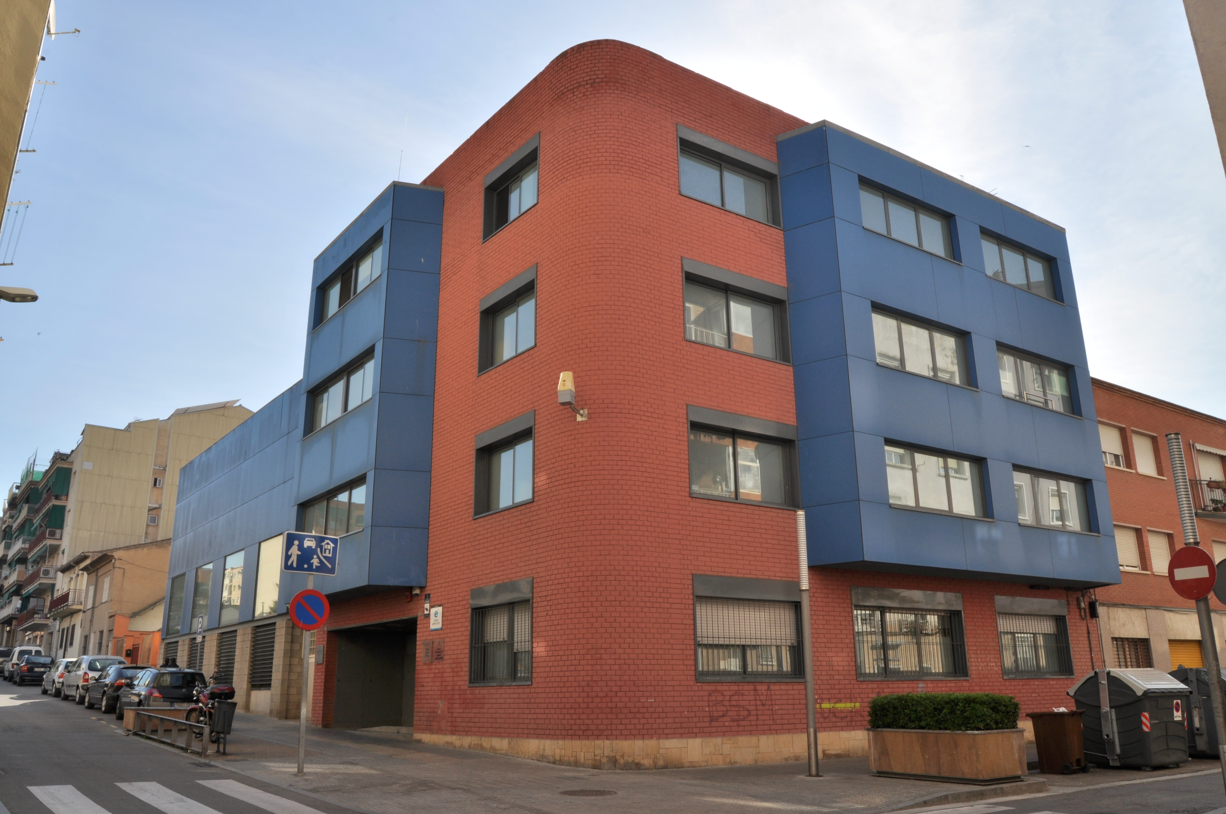 Centre Cívic L'Era (Mollet del Vallès, Vallès Oriental, província de Barcelona, Catalunya).